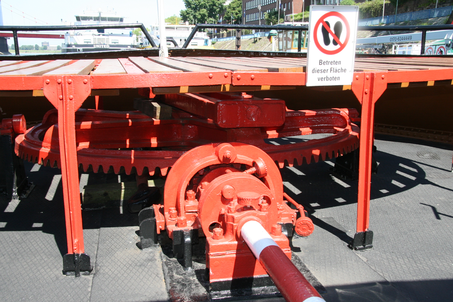 Ruderquadrant eines Raddampfschleppers